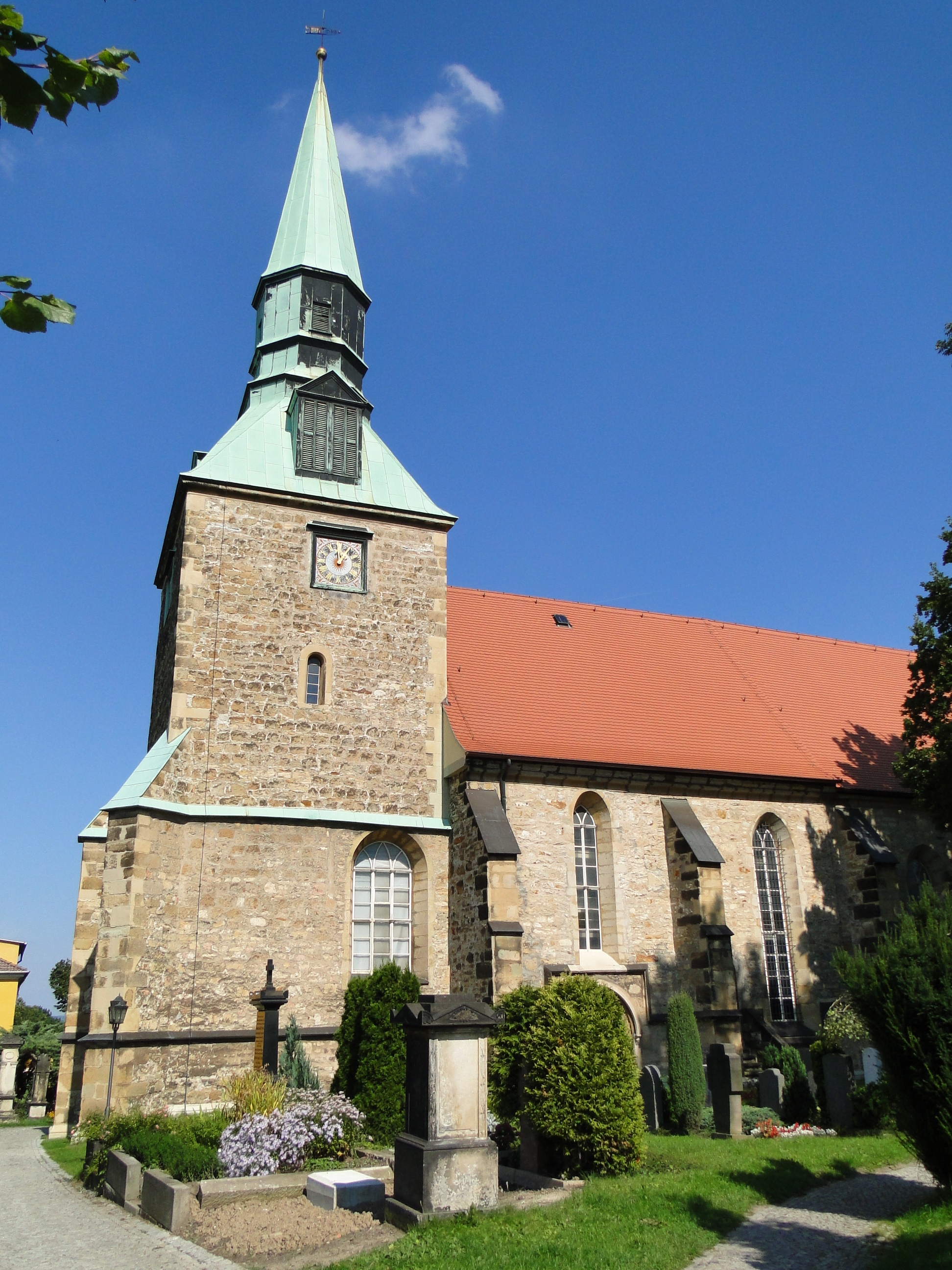 Kirche Leubnitz-Neuostra 2010